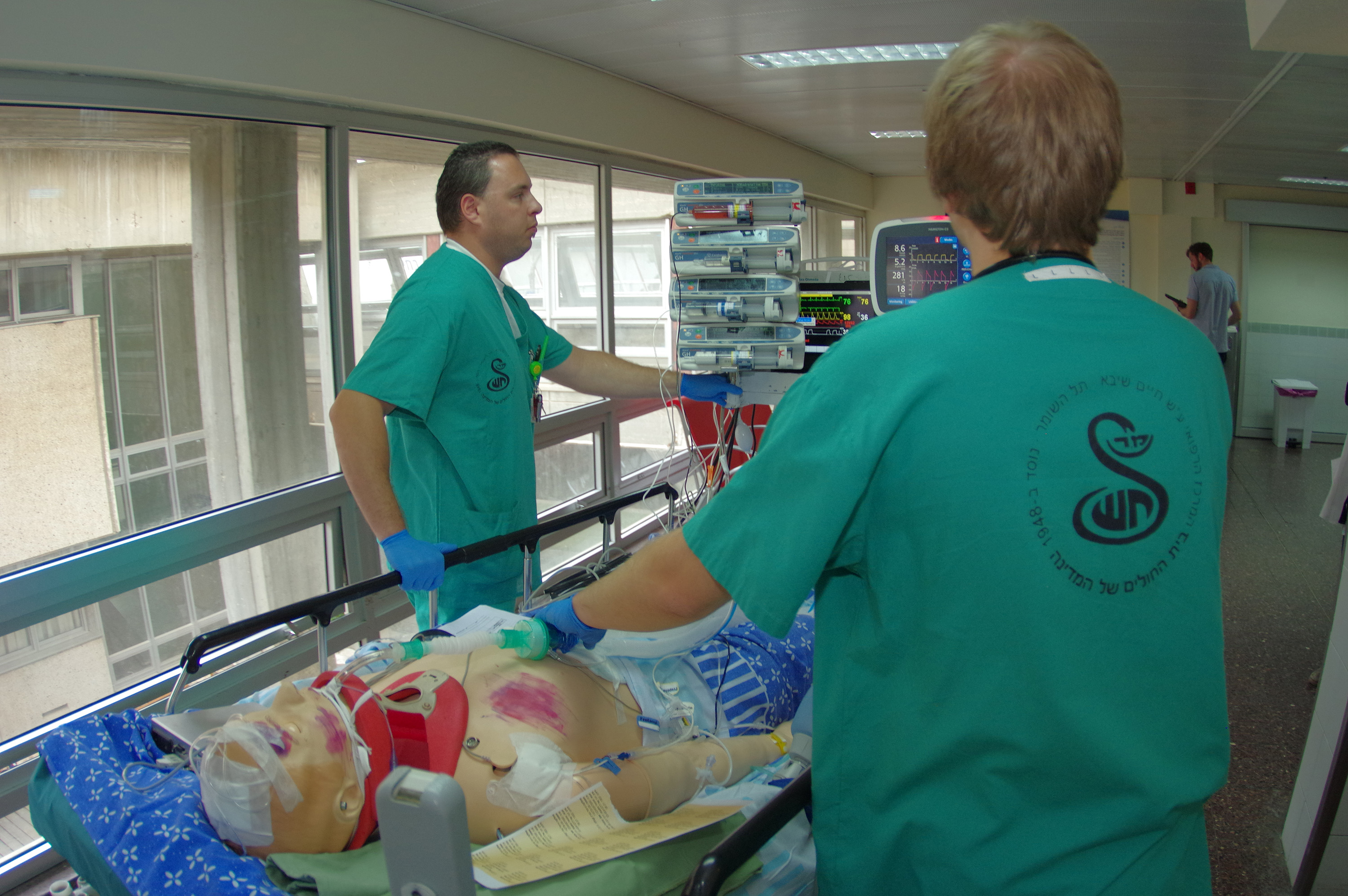 מתוך אימון של טיפול נמרץ עם יחידת מסר על גלגלים